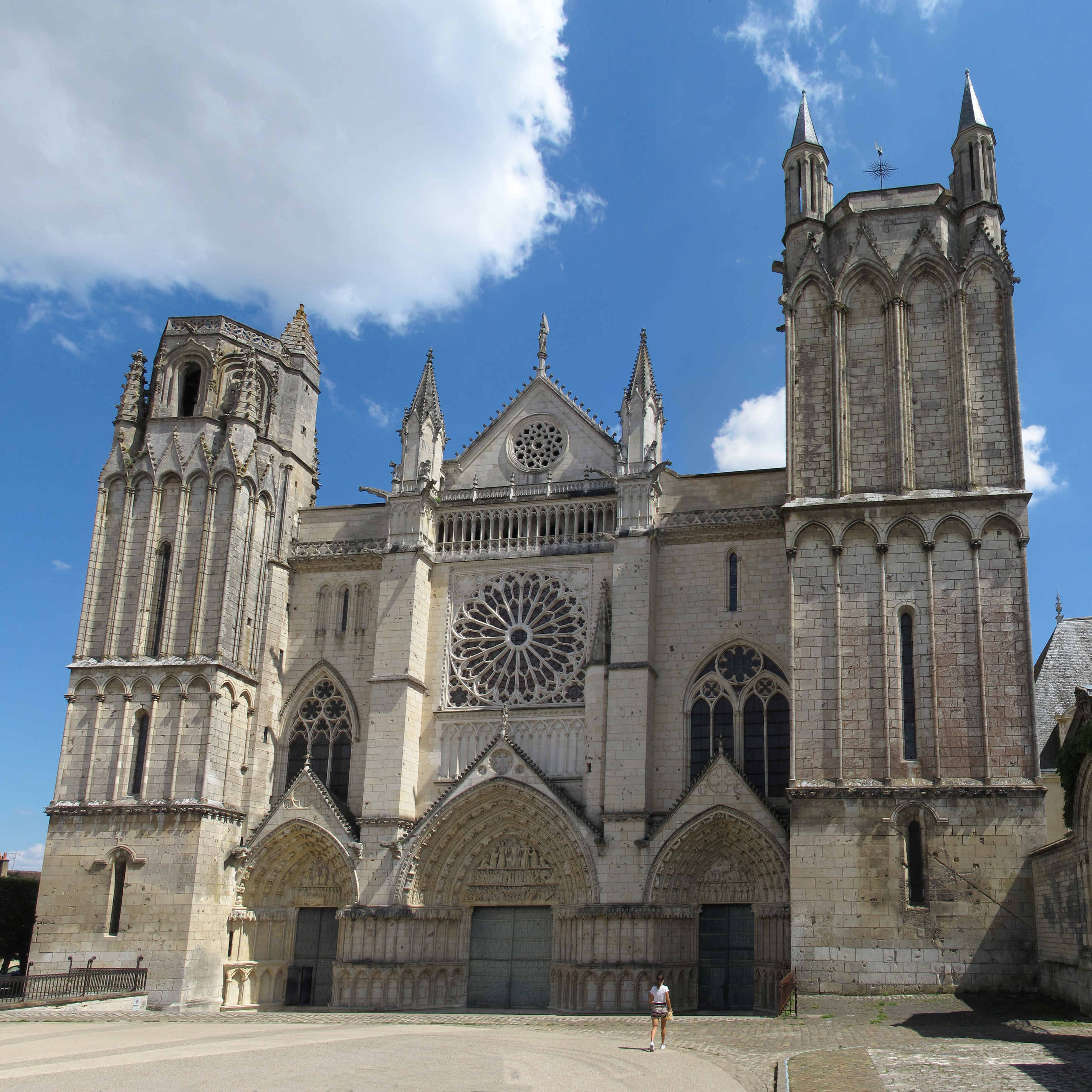 Poitiers (Frankreich): Kathedrale „Saint-Pierre“ (Panorama der Westseite)